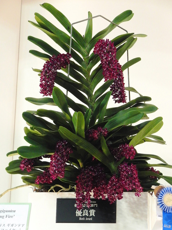 JGP2012【部門1】優良賞・RHS特別賞 Rhy. gigantea 'Spring Fire' 2012/02/18東京ドームにて撮影